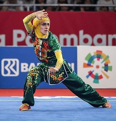 هانیه رجبی در مسابقات ووشو تالو، بازی‌های آسیایی ۲۰۱۸